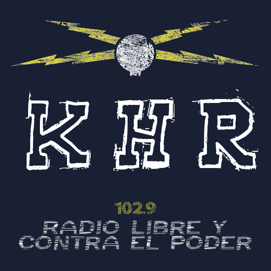 Gráfico promocional de la Ke Huelga Radio